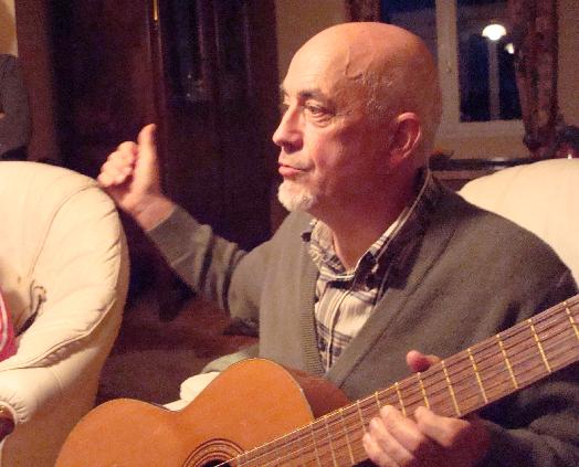 En e di o kanañ ur ganaouenn.